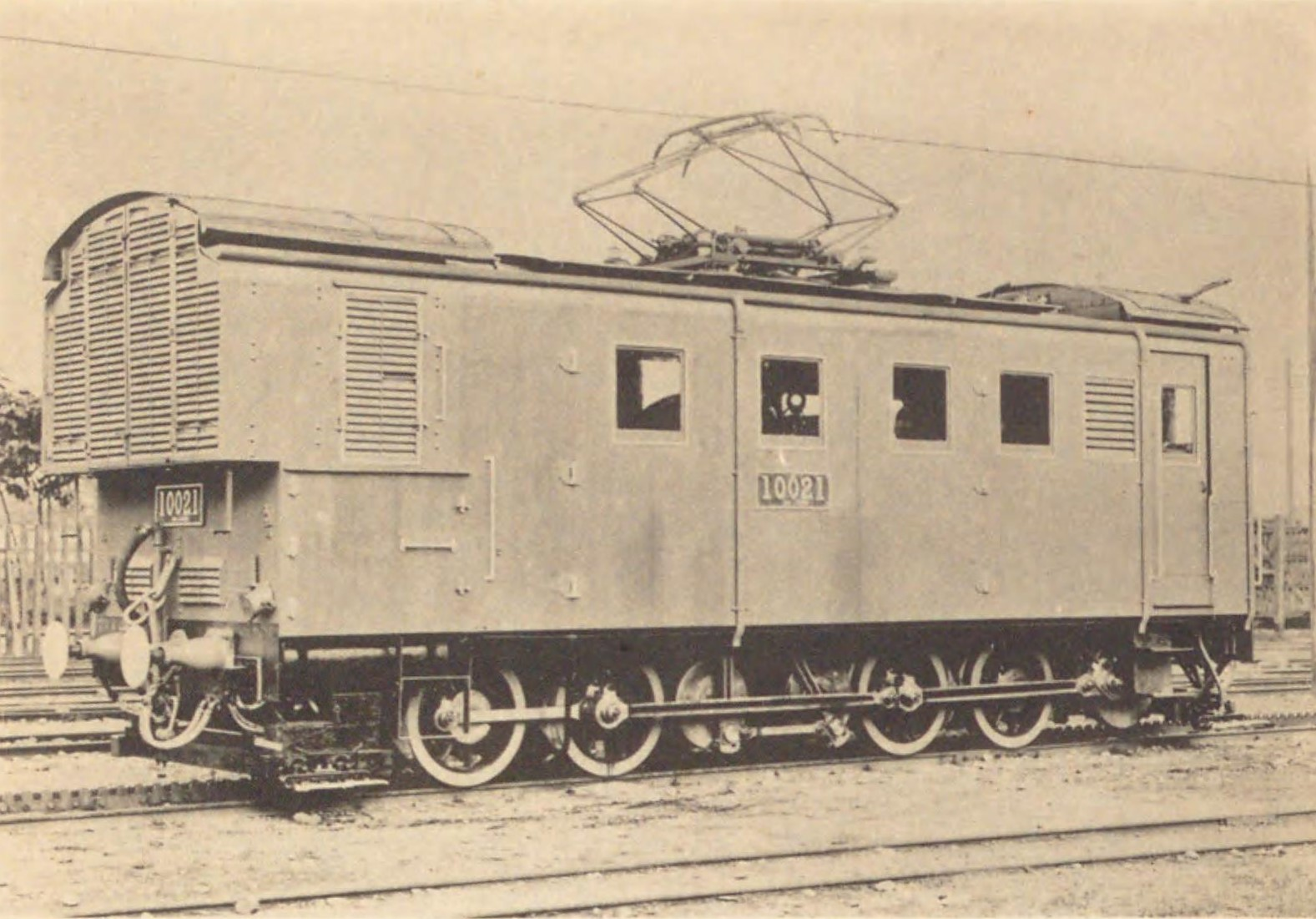 鉄道省10020形電気機関車（のちED40形）。